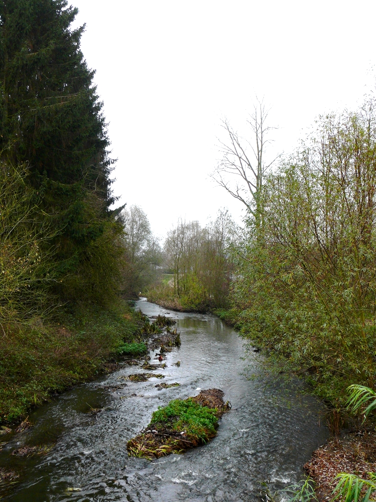 La Chiers (rivière) à Petange (Luxembourg)